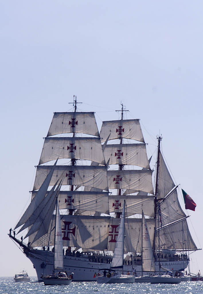 Navio Escola NRP Sagres - na comemoração dos 150 anos da Associação Naval de Lisboa navegando no Tejo. Fotografia tirada no rio Tejo, pelas comemorações dos 150 anos da Associação Naval de Lisboa